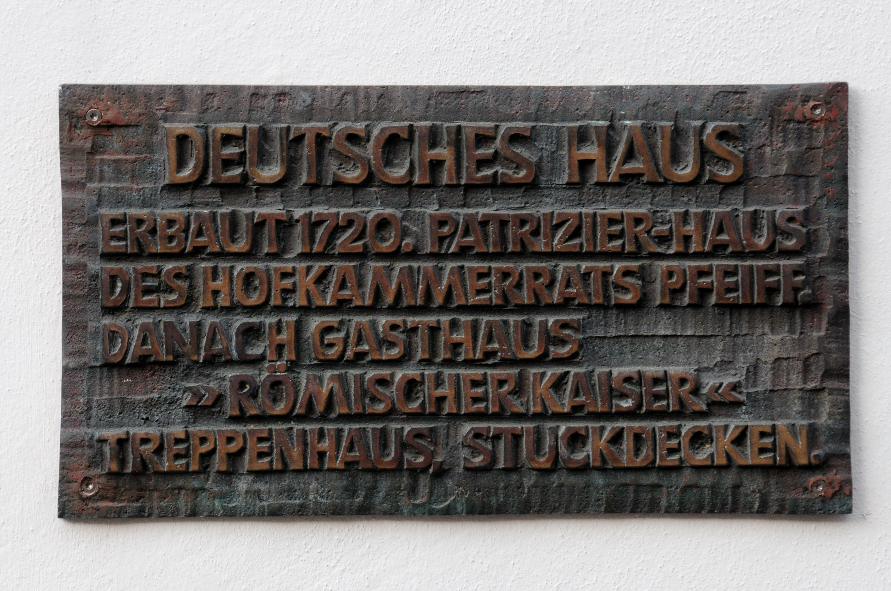 Ackergasse 13 (D)